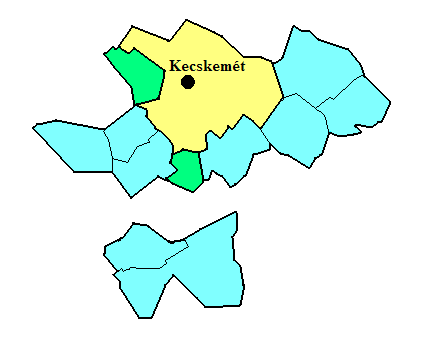 magyar (hu): Kecskemét városrészei: Kecskemét külterületi változásainak vázlatos térképe Kecskemét külterületéből az 1950-es években kivált települések Kecskemét külterületéből az 1950-es években kivált, de később visszatért települések Mindvégig Kecskeméthez tartozó területek